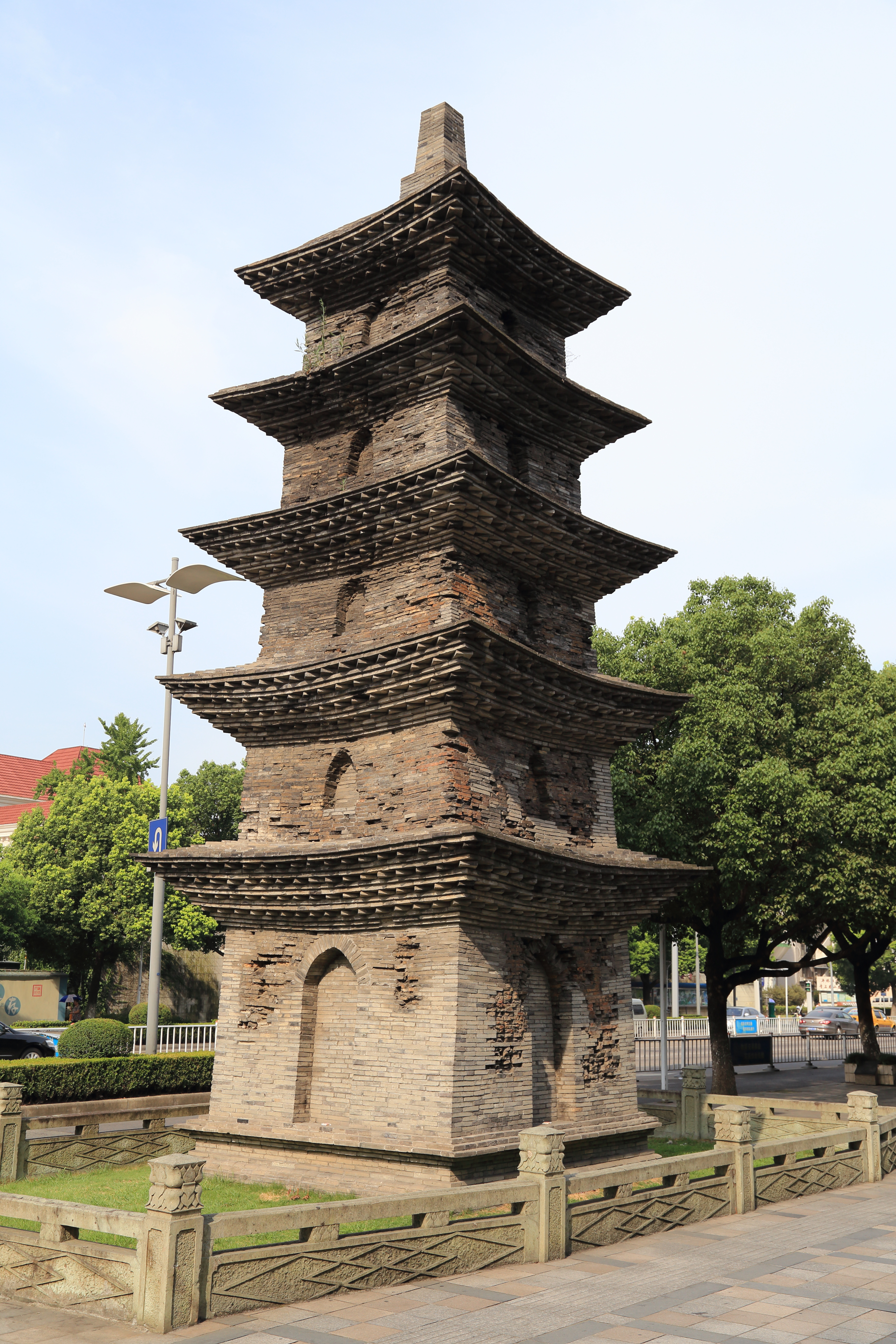 宁波天宁寺